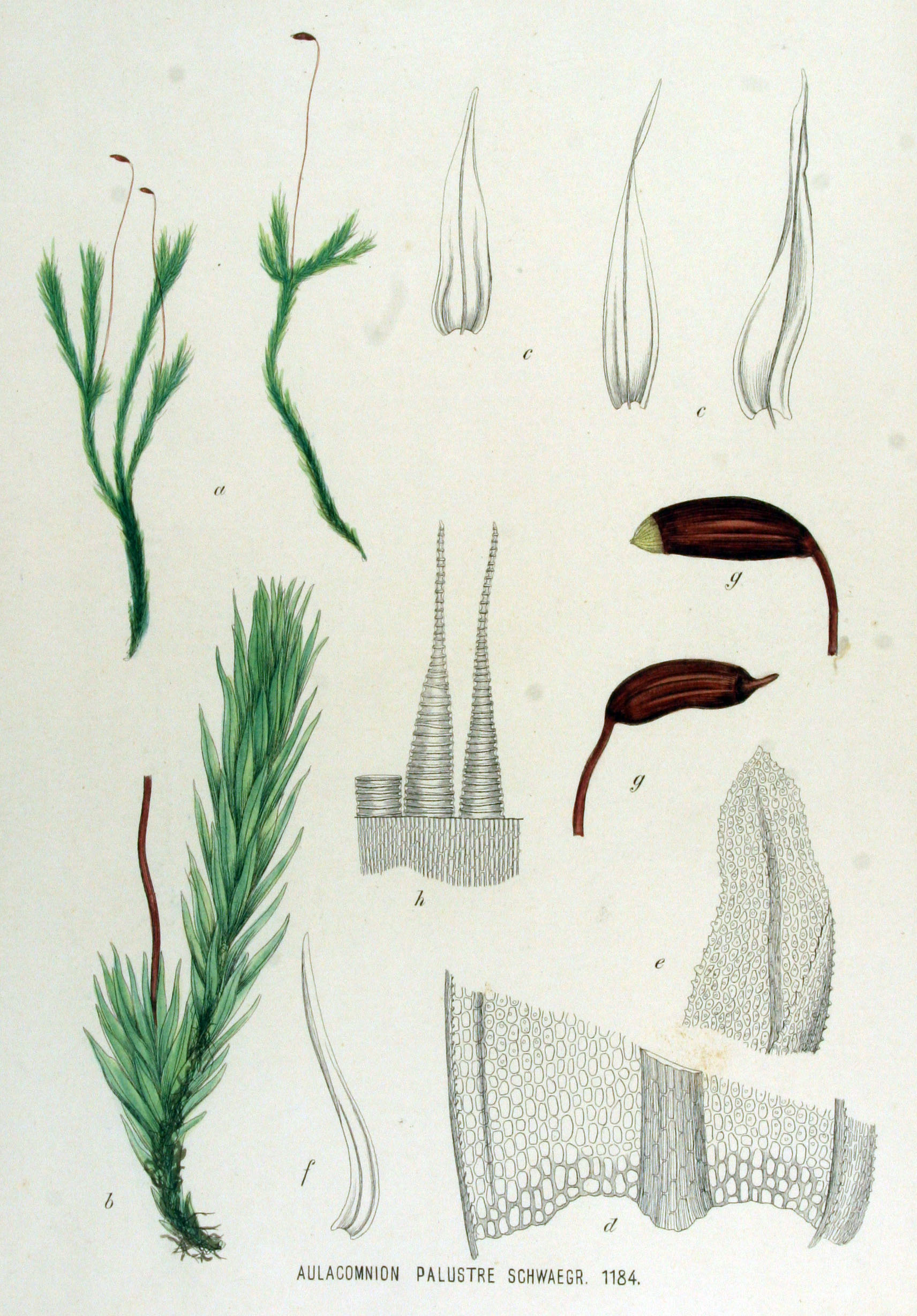 Aulacomnion palustre